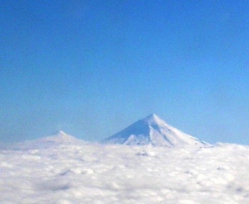 Volcanes Lanín (primer plano, límite entre Argentina y Chile) y Villa Rica (segundo plano, Chile). Foto tomada desde avión a 3000 metros de altura.